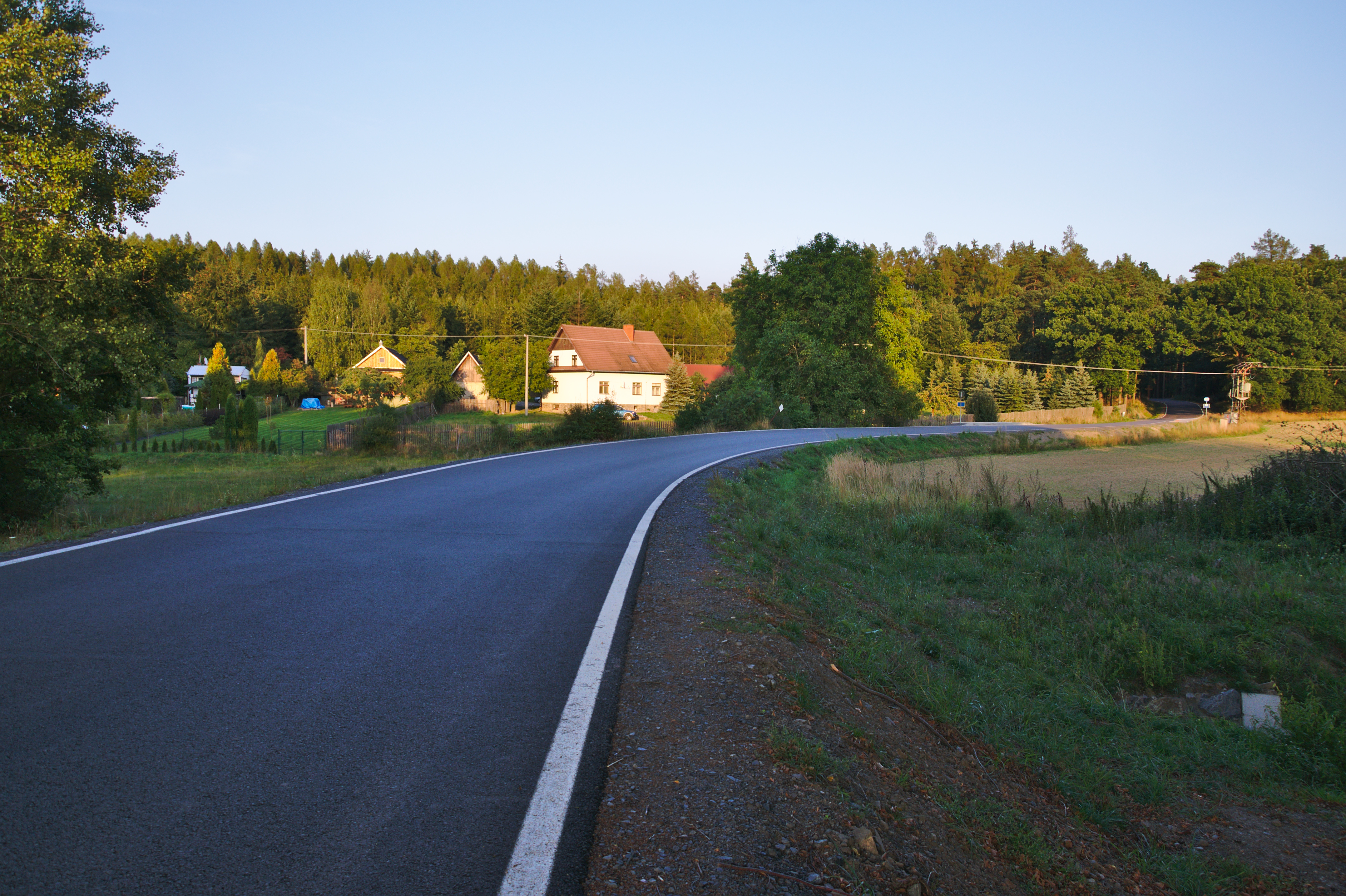 Pohled od mostku přes Ptenku, Pohodlí, Ptení, okres Prostějov